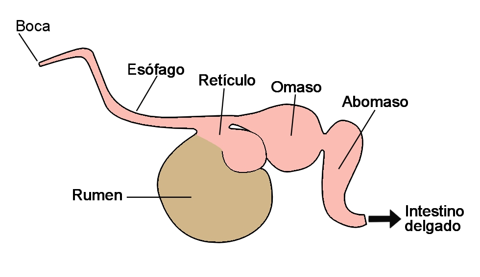 Esquema en el que se representa el esófago y las diferentes cámaras que forman el estómago de los rumiantes